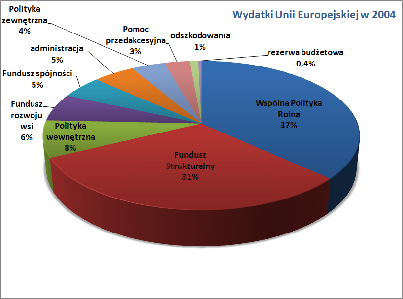 Polska wersja EUexpenditure2004.png